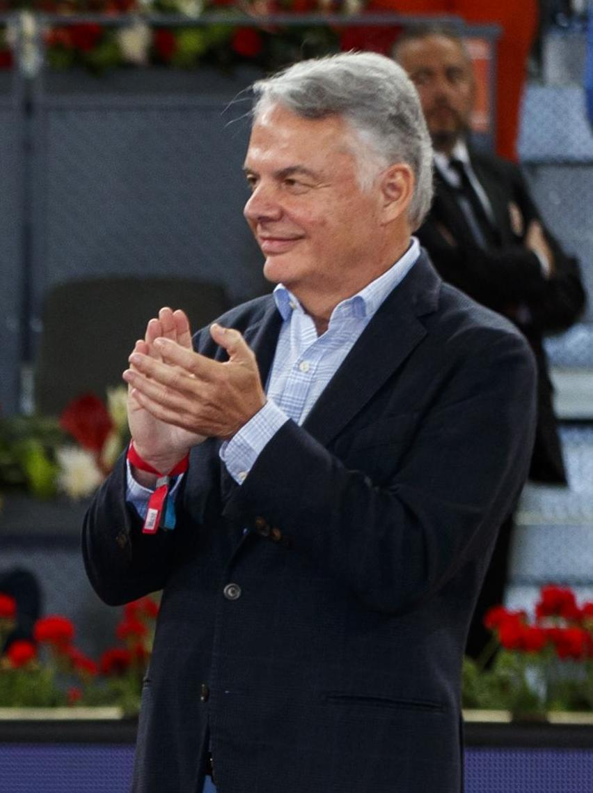 La primera teniente de alcalde del Ayuntamiento de Madrid y concejala de Equidad Derechos Sociales y Empleo, Marta Higueras, ha sido la encargada de entregar anoche el premio a la campeona del Mutua Madrid Open femenino Petra Kvitova, que con esta victoria ha marcado un hito en el torneo madrileño: se ha convertido en la primera tenista que gana tres veces la prueba, por delante de Serena y Halep.